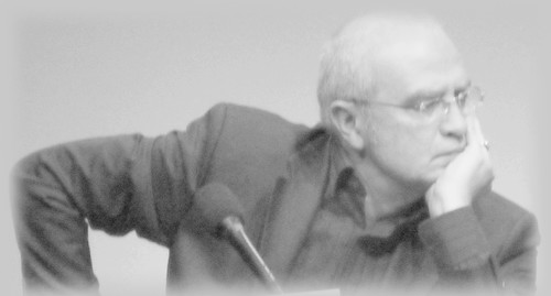 Richard Millet au Centre Georges Pompidou le 08 novembre 2010